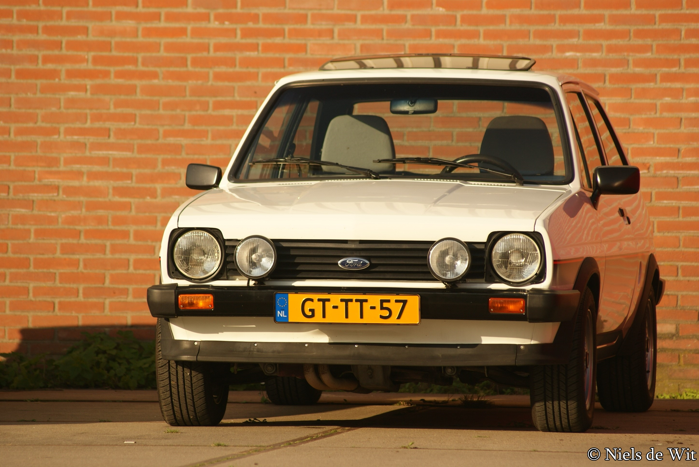 GT-TT-57 Ford Onderdelendag, Barneveld